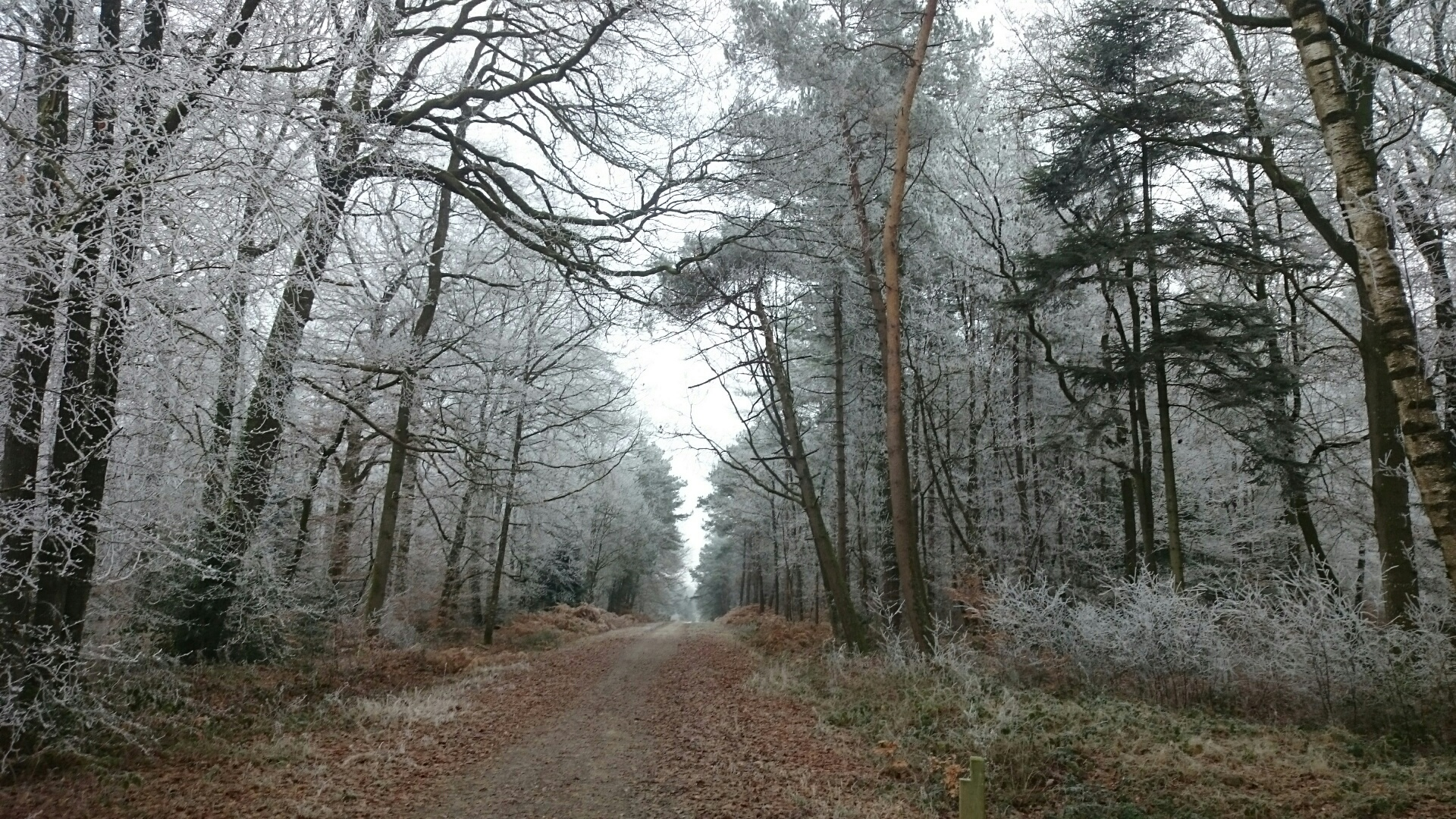 Forêt domaniale de Liffré, le 31 décembre 2016